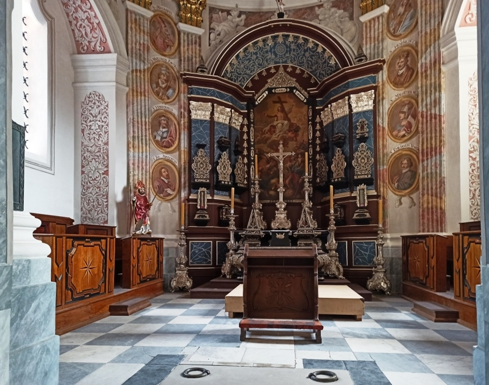 Kaplica Zbawiciela Frombork kaplica Szembeka, rok 2020